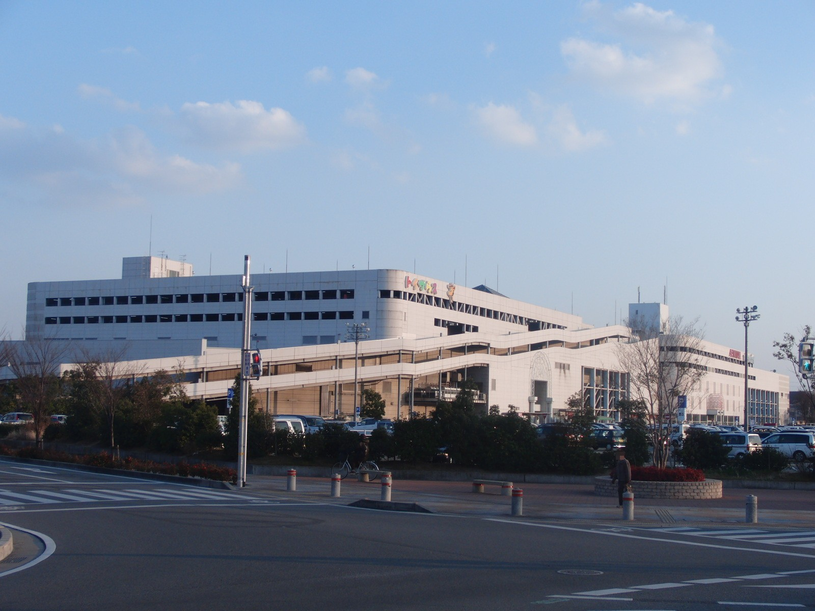 イオンモール姫路リバーシティを撮影